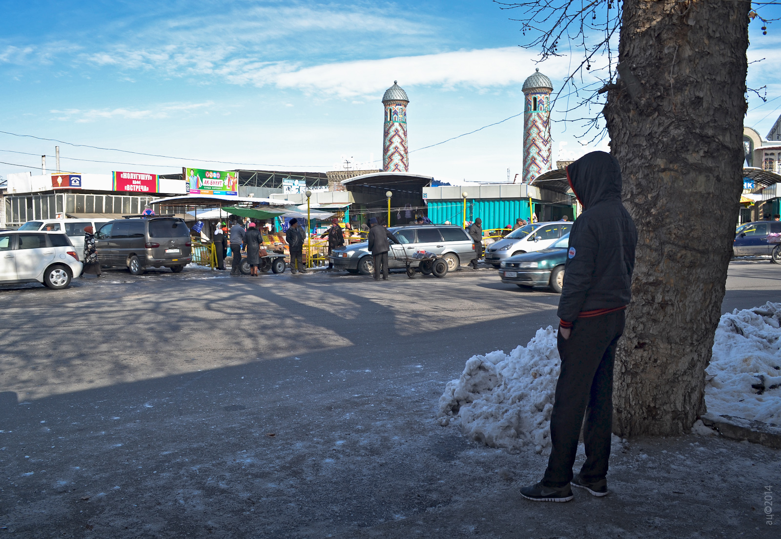 Usgen